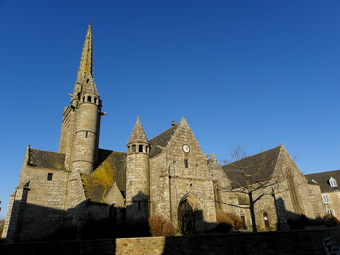 Église Saint-Milliau de Ploumilliau (22). Flanc sud.